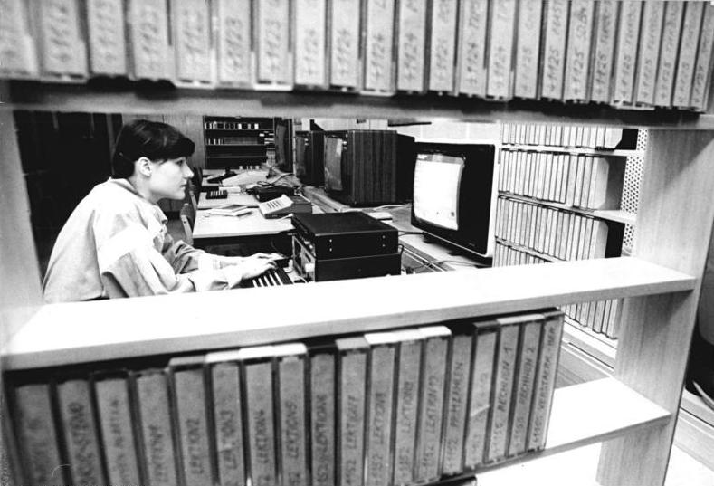 Dresden, Softwarebibliothek, Nutzerin ADN-ZB Hiekel 8.5.89 Dresden: Erste Softwarebibliothek- An der Stadt- und Bezirksbibliothek Dresden wurde eine Softwarebibliothek eingerichtet, die in ihrer Art bisher einmalig in der DDR ist. Sie stellt zur öffentlichen Nutzung Software für Klein- und Heimcomputer bereit. Man kann sich dort mit der Computertechnik vertraut machen. Die Bibliothekarin Daniela Sitte-Zöllner erarbeitet hier ein Informationsprogramm für Nutzer der Bibliothek. Ab 6. Mai stehen auf Kassette gespeicherte Programme, Informationen und Daten für die präsente Ausleihe und ab Oktober für die Vergabe "außer Haus" zur Verfügung. Bisher umfaßt die Bibliothek 850 Programme, darunter Text- und Datenverarbeitung, Grafiklehr-, Dienst- und Hilfsprogramme und eine Vielzahl von Spielen.